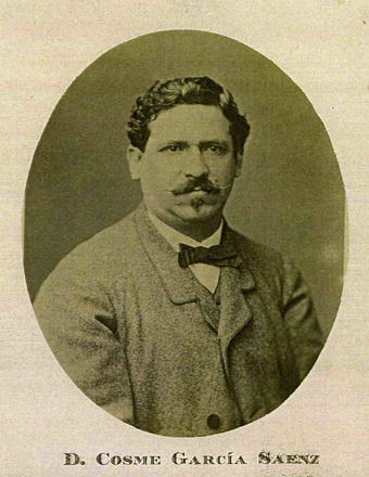 Cosme García Saez. (1818-1874)